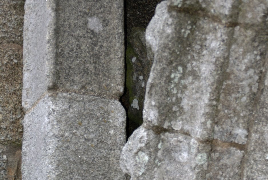 Chapelle de Tronoën tête du maître d'oeuvre